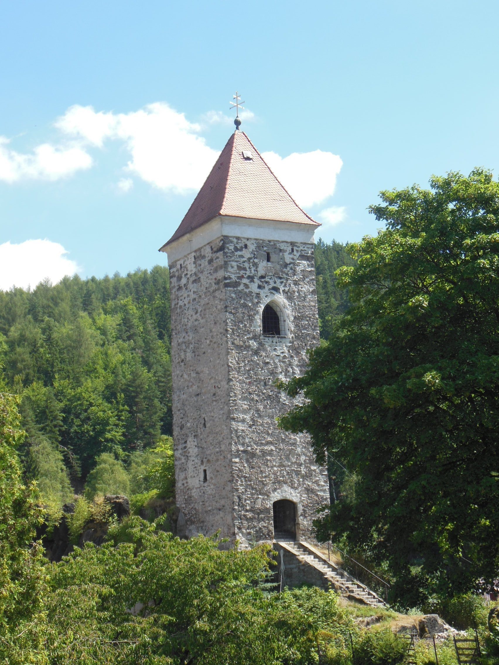 Černá věž v Nejdku (okres Karlovy Vary). Pohled z ulice Žižkova.